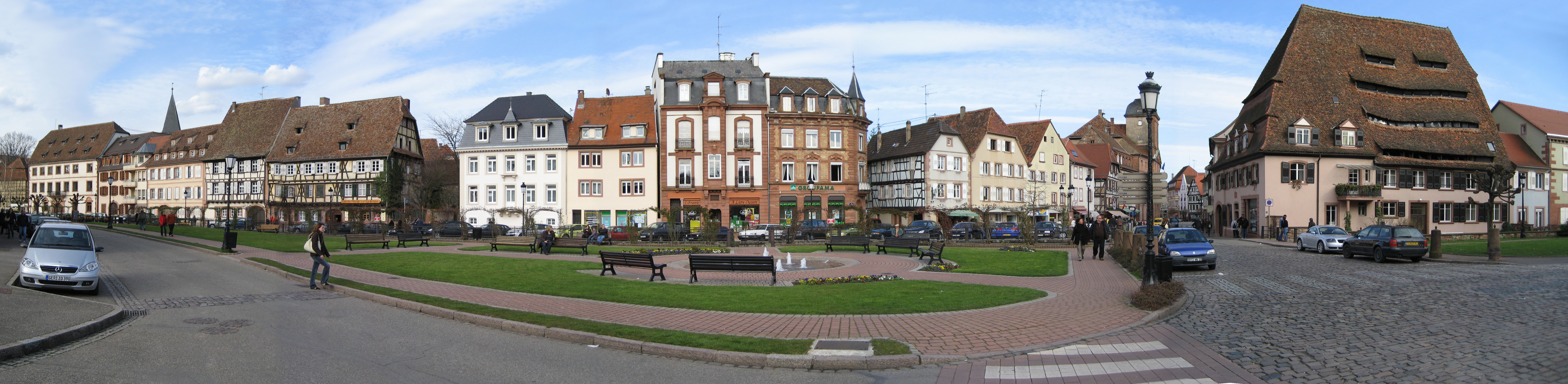 Weißenburg, Altes Salzhaus